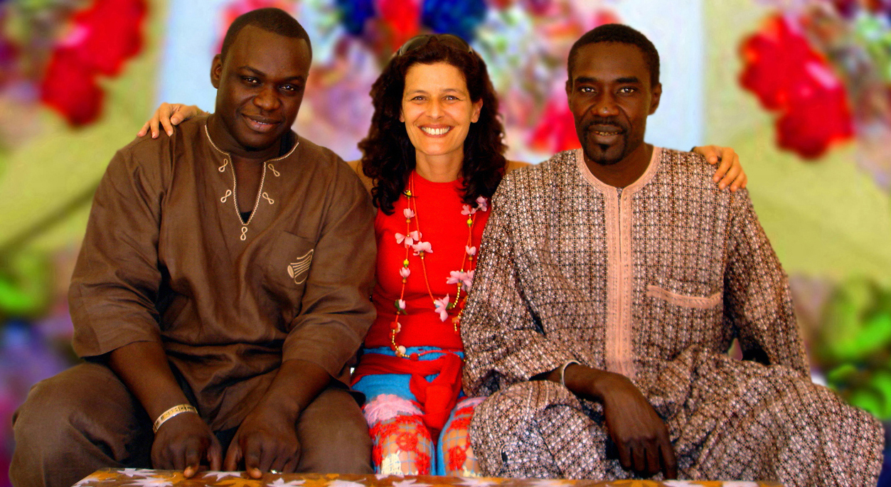 Fotografia de Pilar Homem de Melo, com Thio Mbaye e Habib Faye.